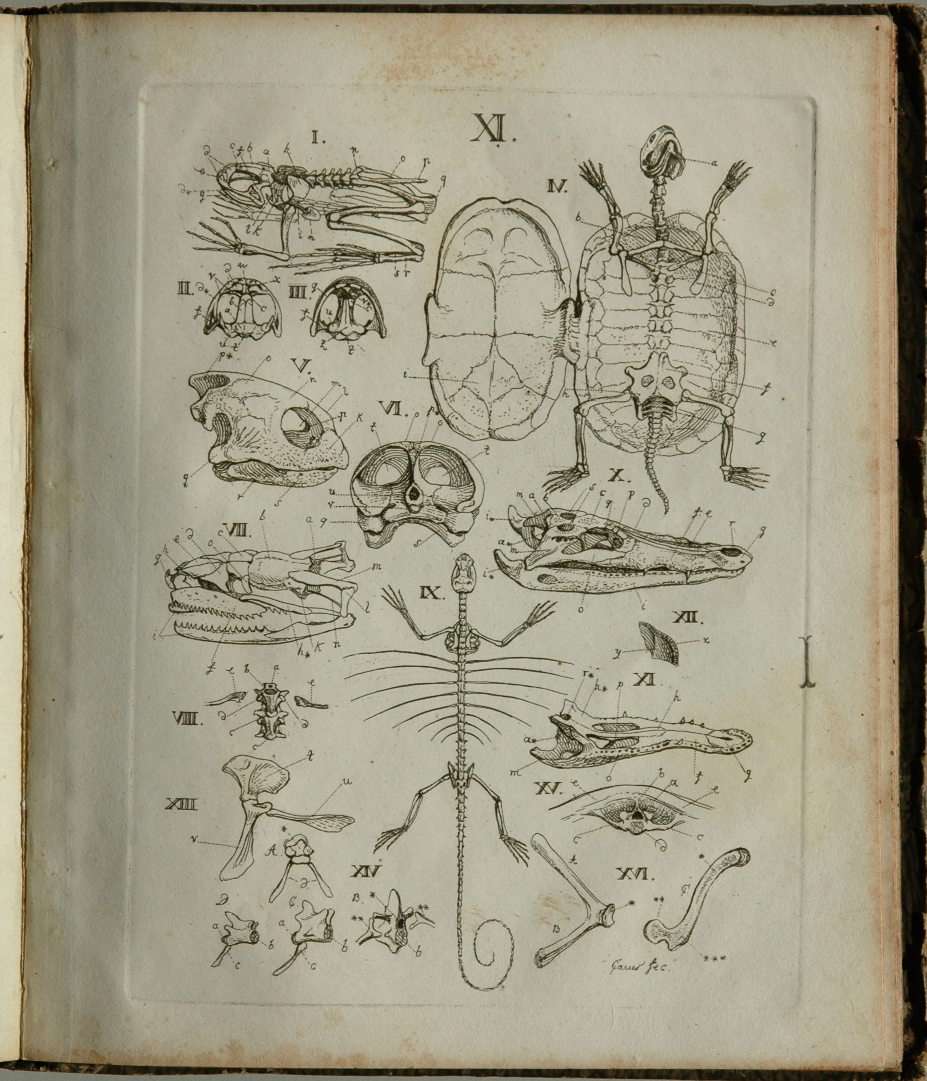 Kupferstich aus "Zwanzig Kupfertafeln zur Zootomie" [einer Monographie über vergleichende Anatomie, erschienen 1818] des 29-jährigen C. G. Carus, Tafel XI.